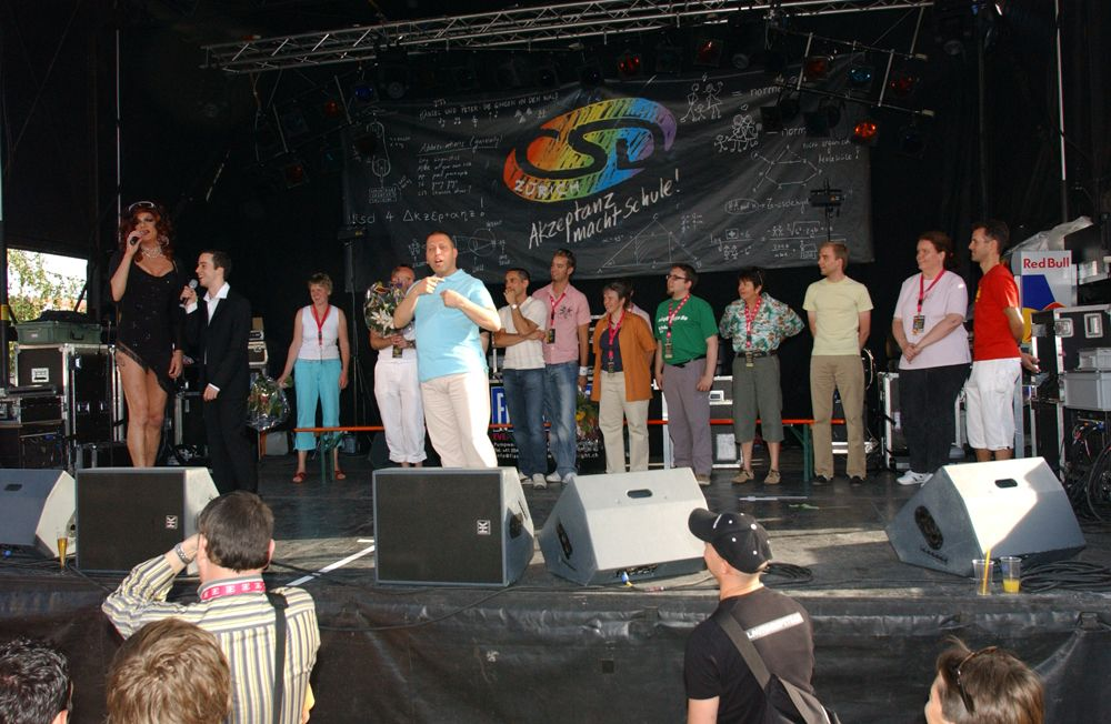 CSD Zurich 2006